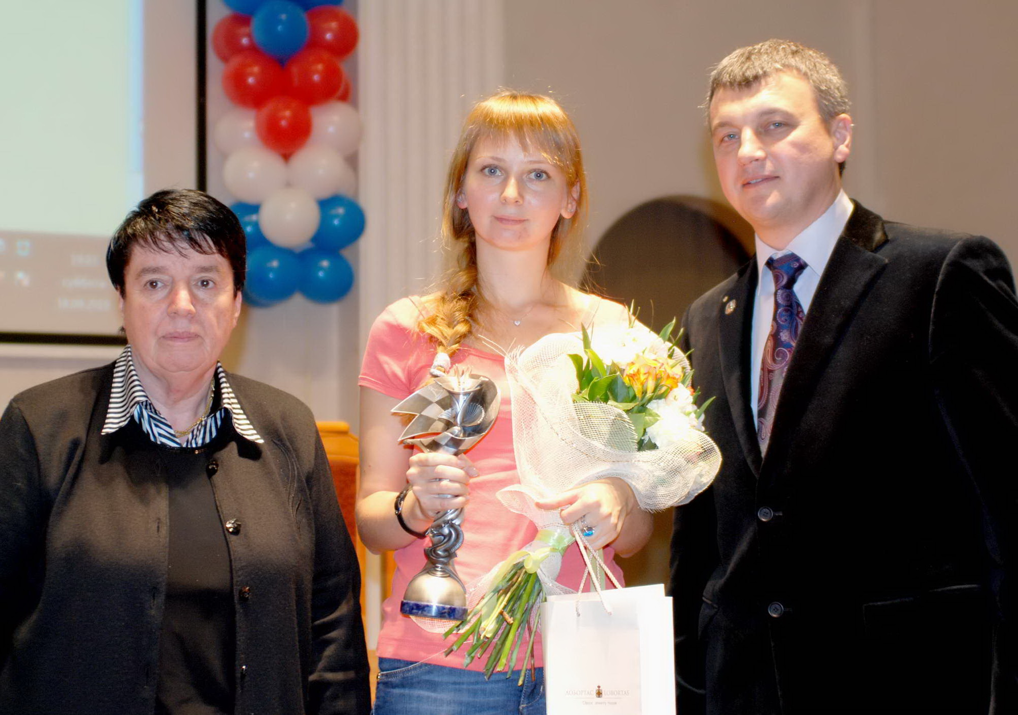 Вручение Надежде Косинцевой женского шахматного Оскара